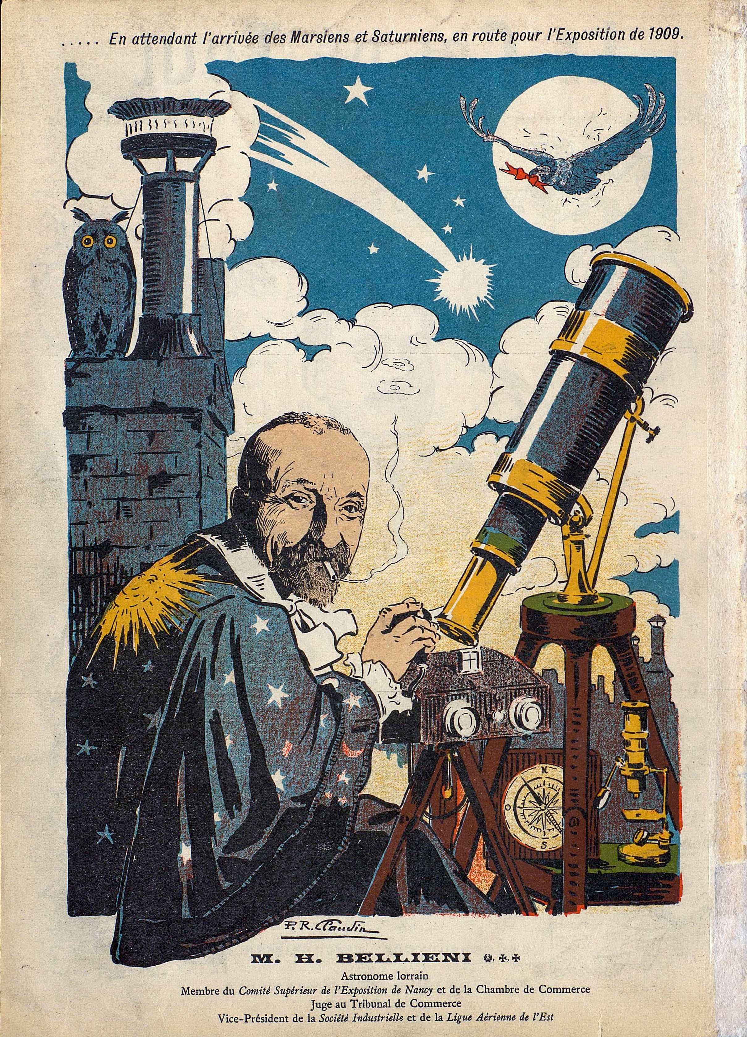 Henri Bellieni Cri de Nancy 24 avril 1909